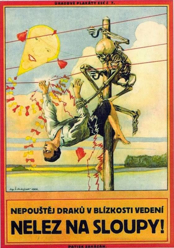 Elektrotechnický svaz československý (ESČ) vydává ve firmě Edice umělecké reklamy Jana Zieglrose sérii "Úrazové plakáty" od Ing. Š. Andrýska v počtu kolem 30.